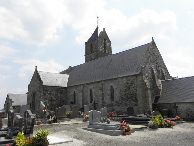 Église paroissiale Saint-Pierre de Courtils (50).